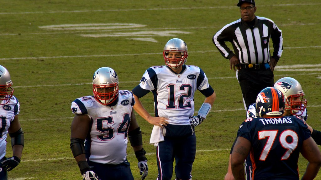 Tom Brady les mains sur les hanches face aux Broncos de Denver en 2011.